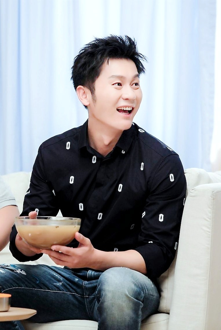 超级可爱了我们晨ớ ₃ờ (李晨)